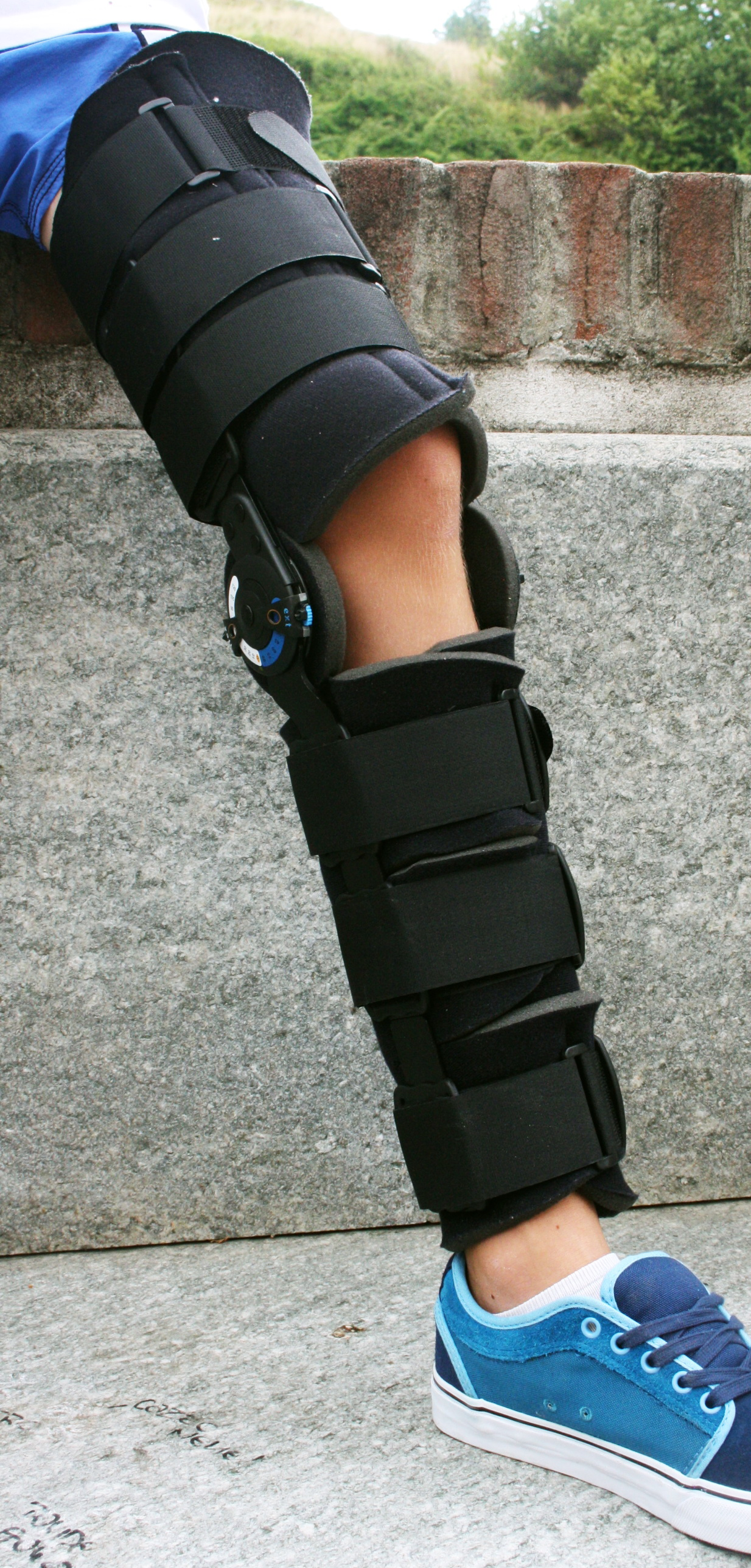 Texasschiene mit Einstellmöglichkeit des Kniebeugewinkels.